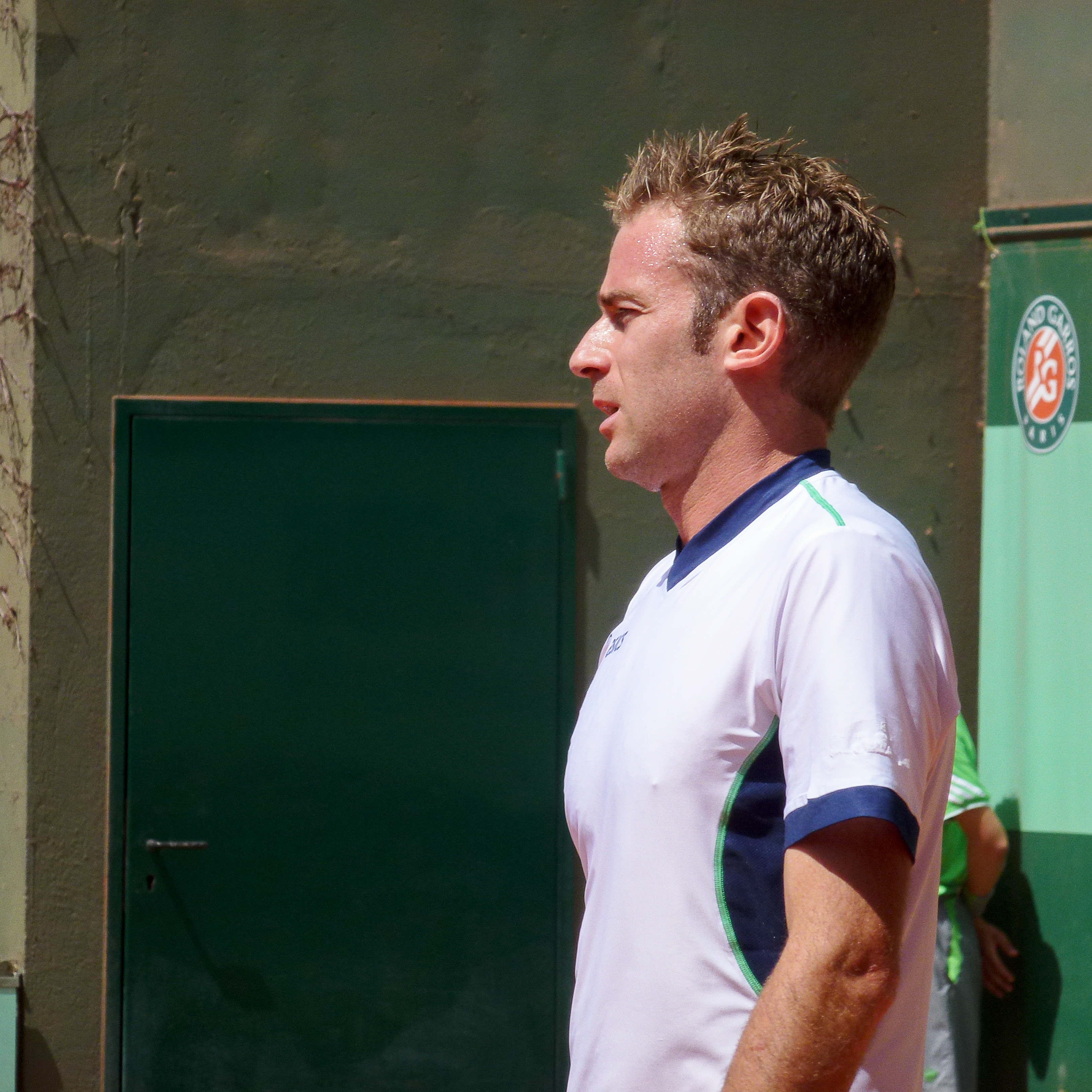 Arnaud Clement (FRA) def. Filippo Volandri (ITA) Roland Garros 2011 - mardi 24 mai - 1er tour